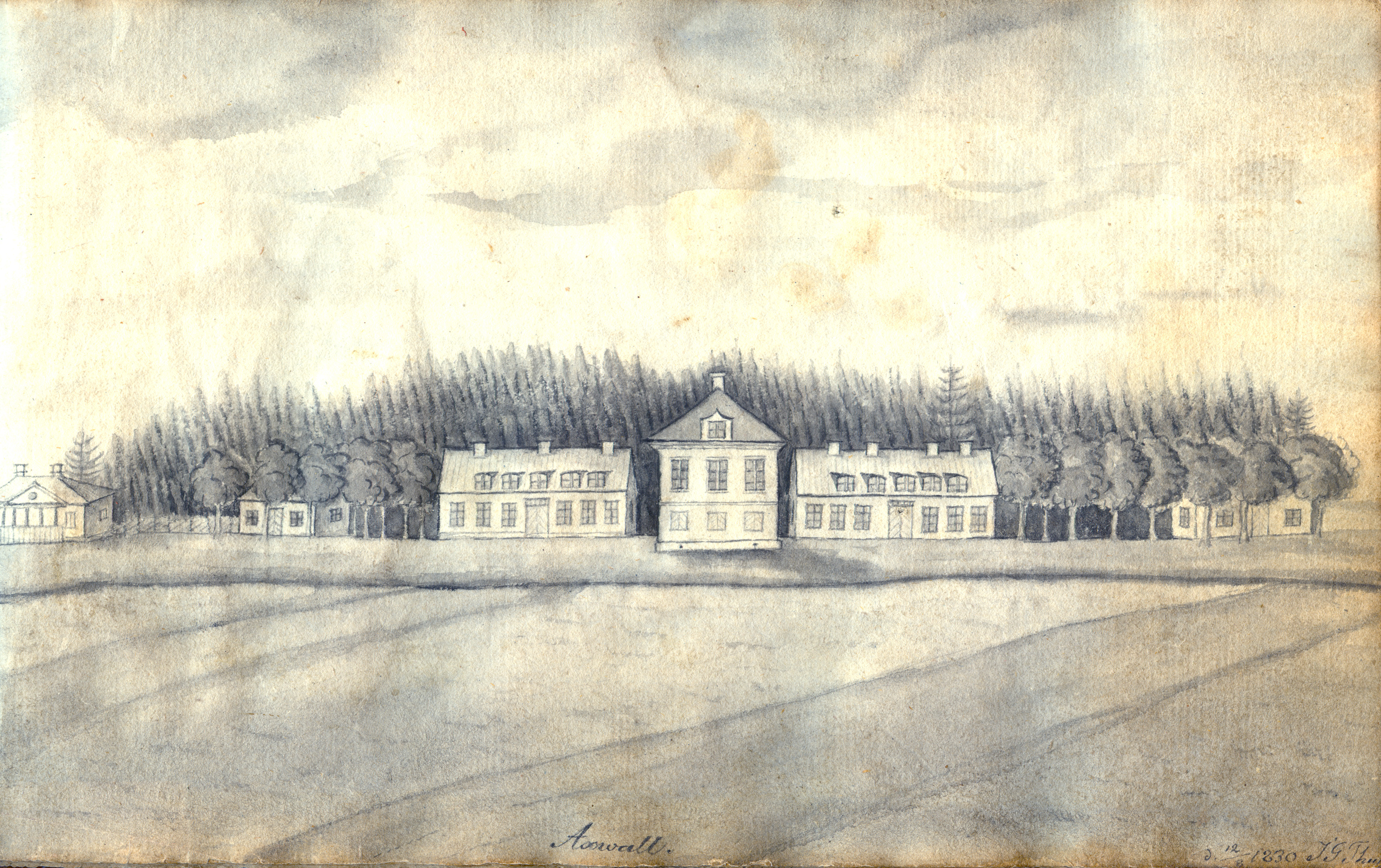 Laverad tuschteckning av Axvall, daterad 12 august 1830 Källa: Stifts- och landsbiblioteket i Skara: MS Geografi Västergötland 1, bild 9